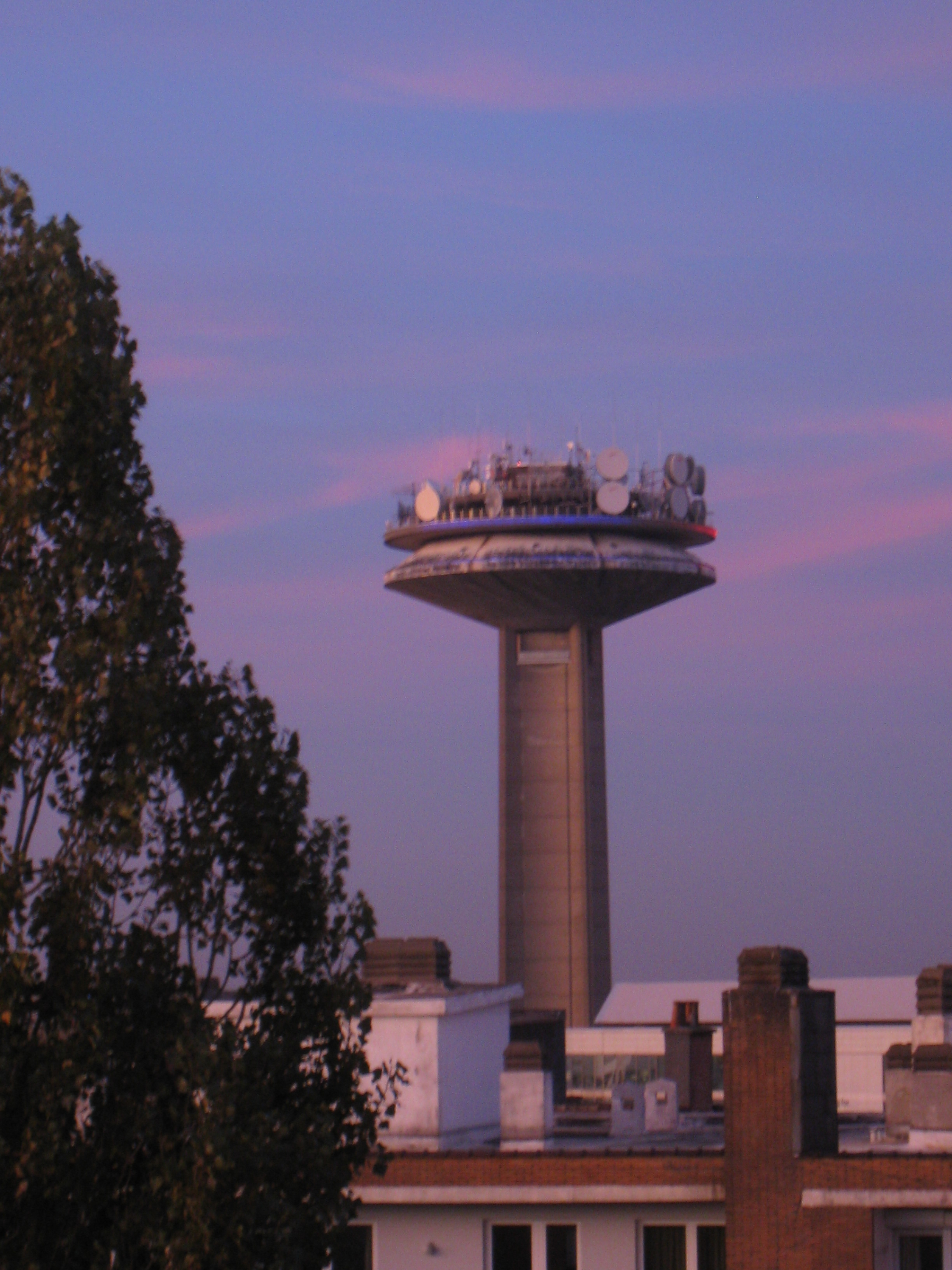 La tour RTBF à Bruxelles